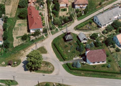 Szilvágy, Hungary, aerialphotography